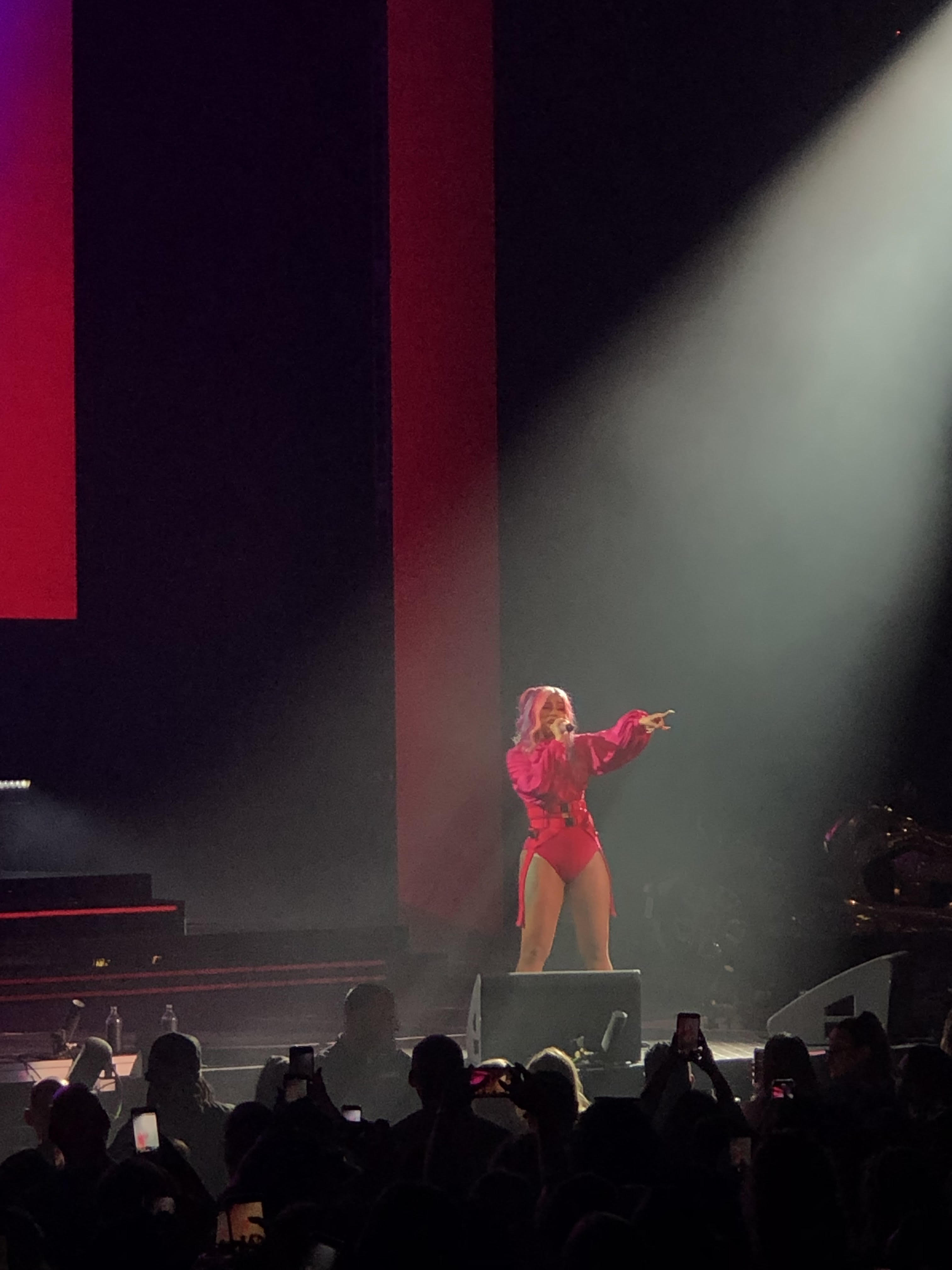 cardi b